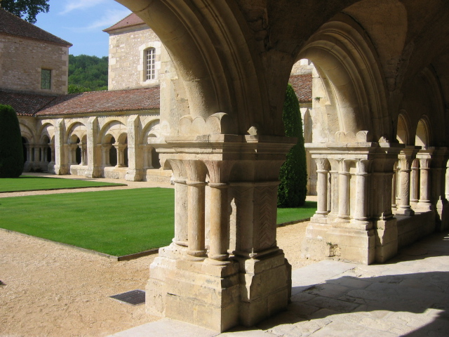 Abbaye de Fontenay, France : cloître.